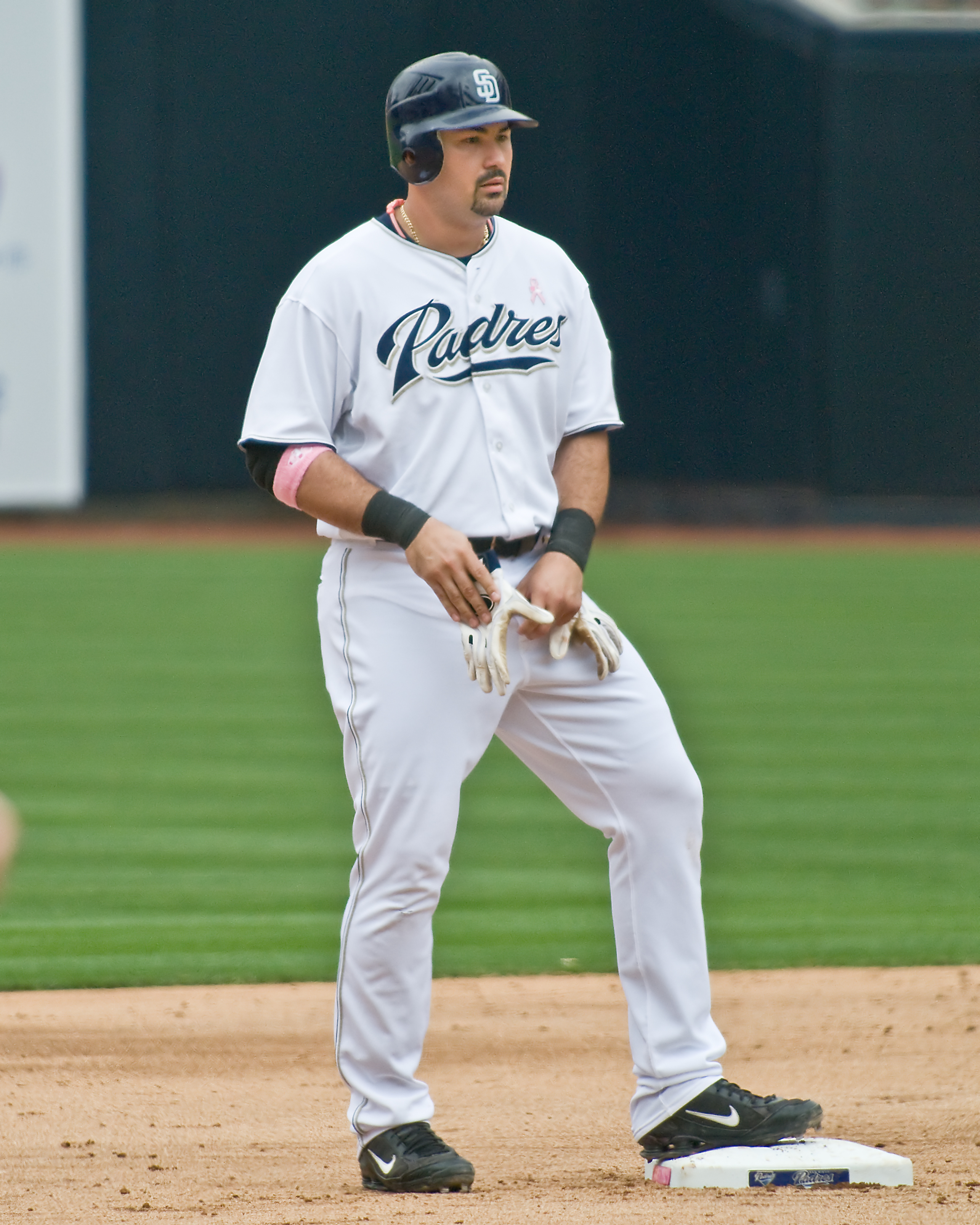 Adrian Gonzalez